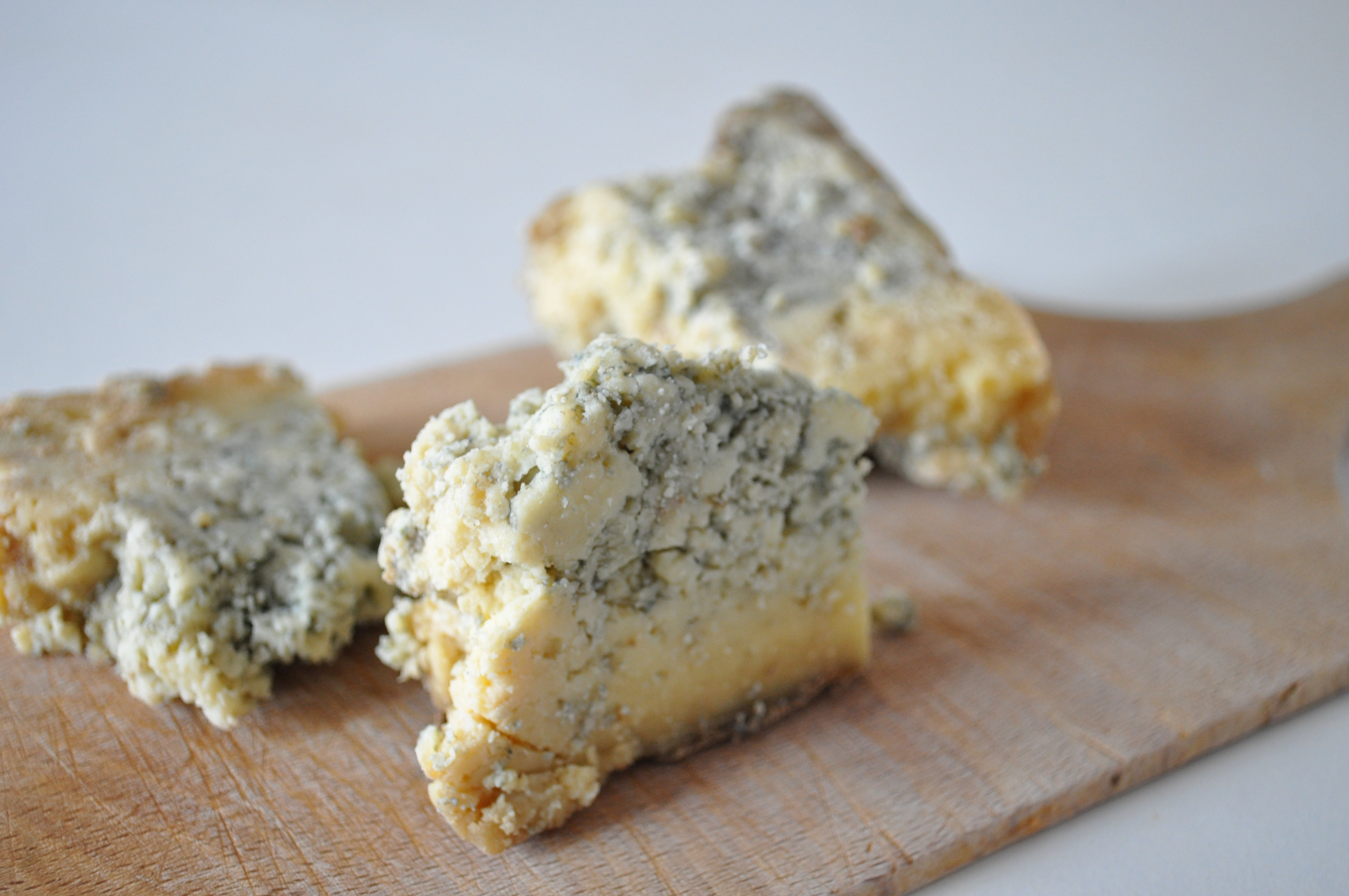 Bleu de Termignon très fait